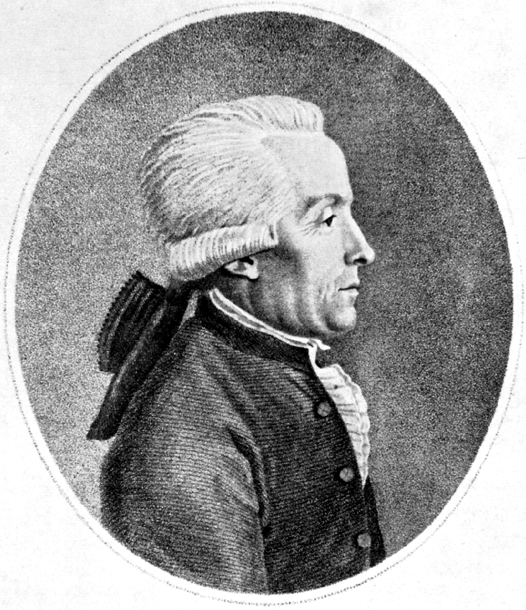 Jean-Andre Venel im Alter von etwa 50 Jahren